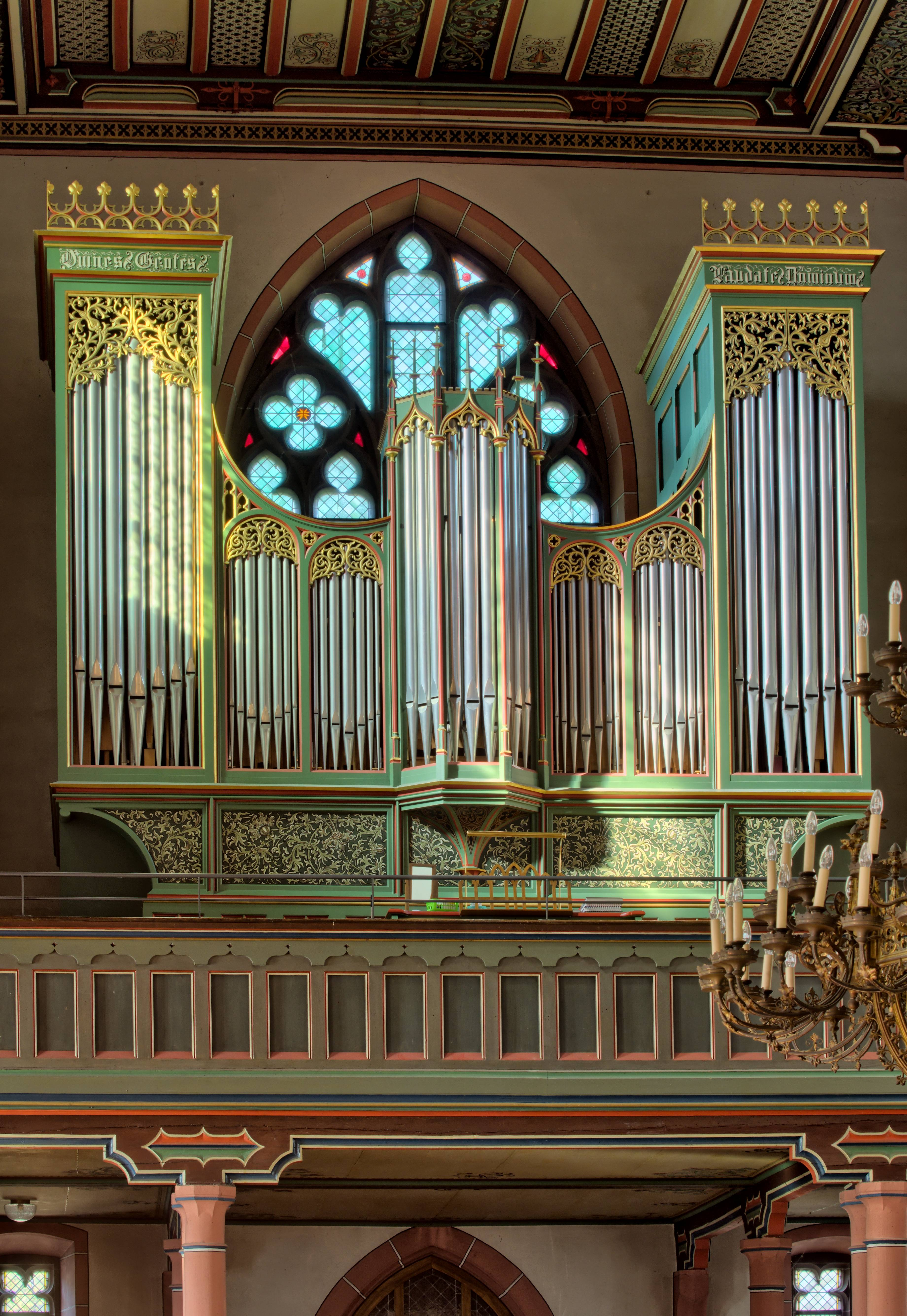 Die katholische Kirche St. Blasius im Glottertal Die Orgel